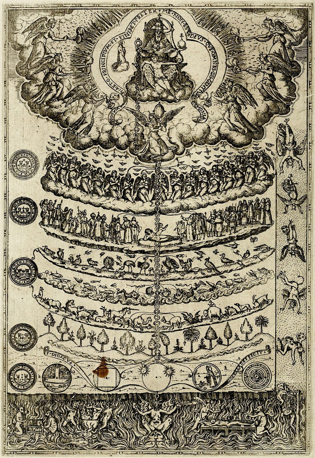 The Great Chain of Being from the Rhetorica christiana by Fray Diego de Valades (1579)